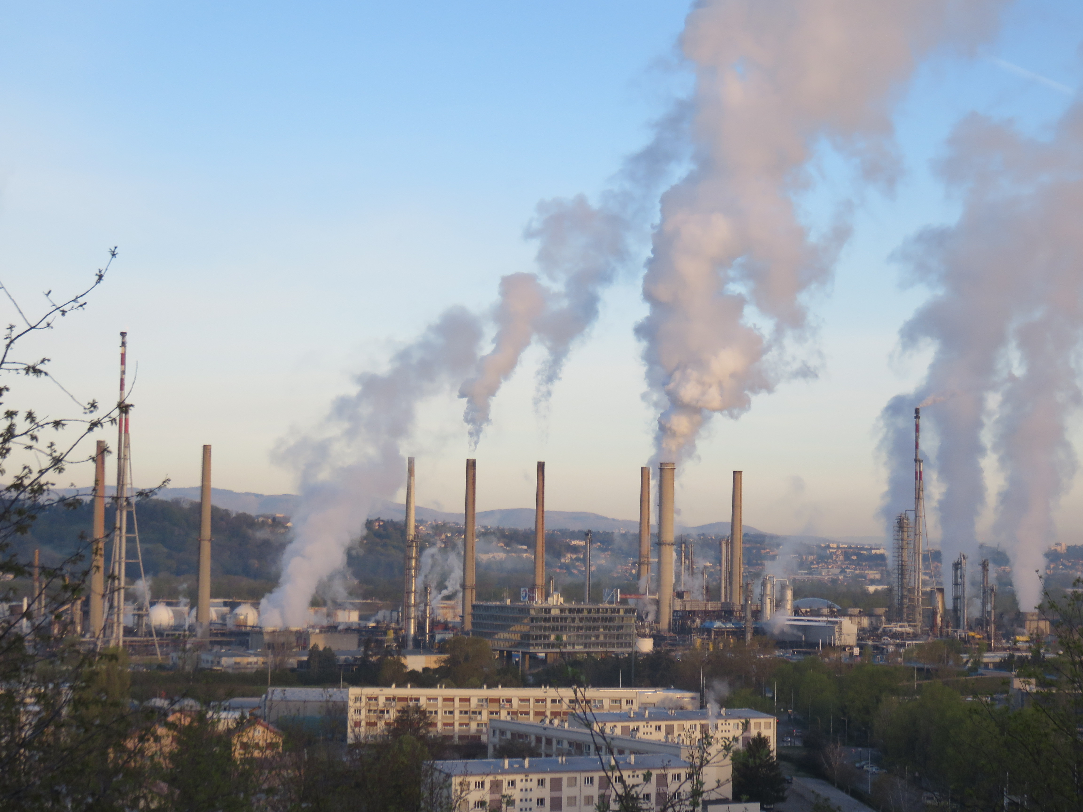 Vue de la raffinerie de Feyzin depuis la partie haute de la ville de Feyzin (vers l'église).